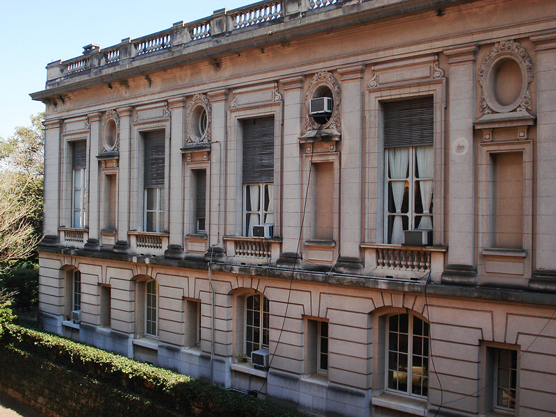 Palácio Piratini, Porto Alegre, Brasil. Detalhe da ala residencial